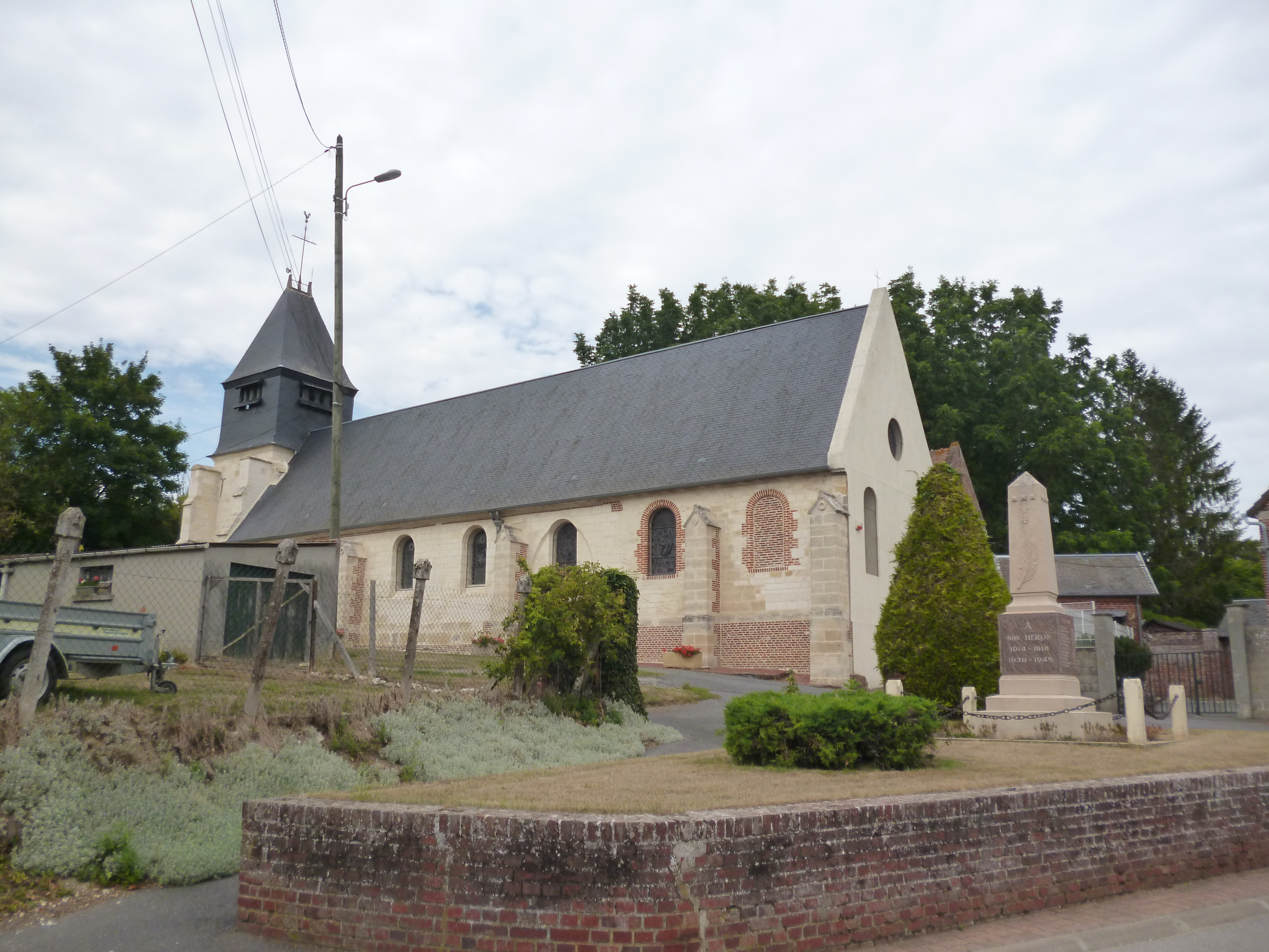 Monument aux morts et église Saint-Nicolas de la commune de Plainval (Oise).